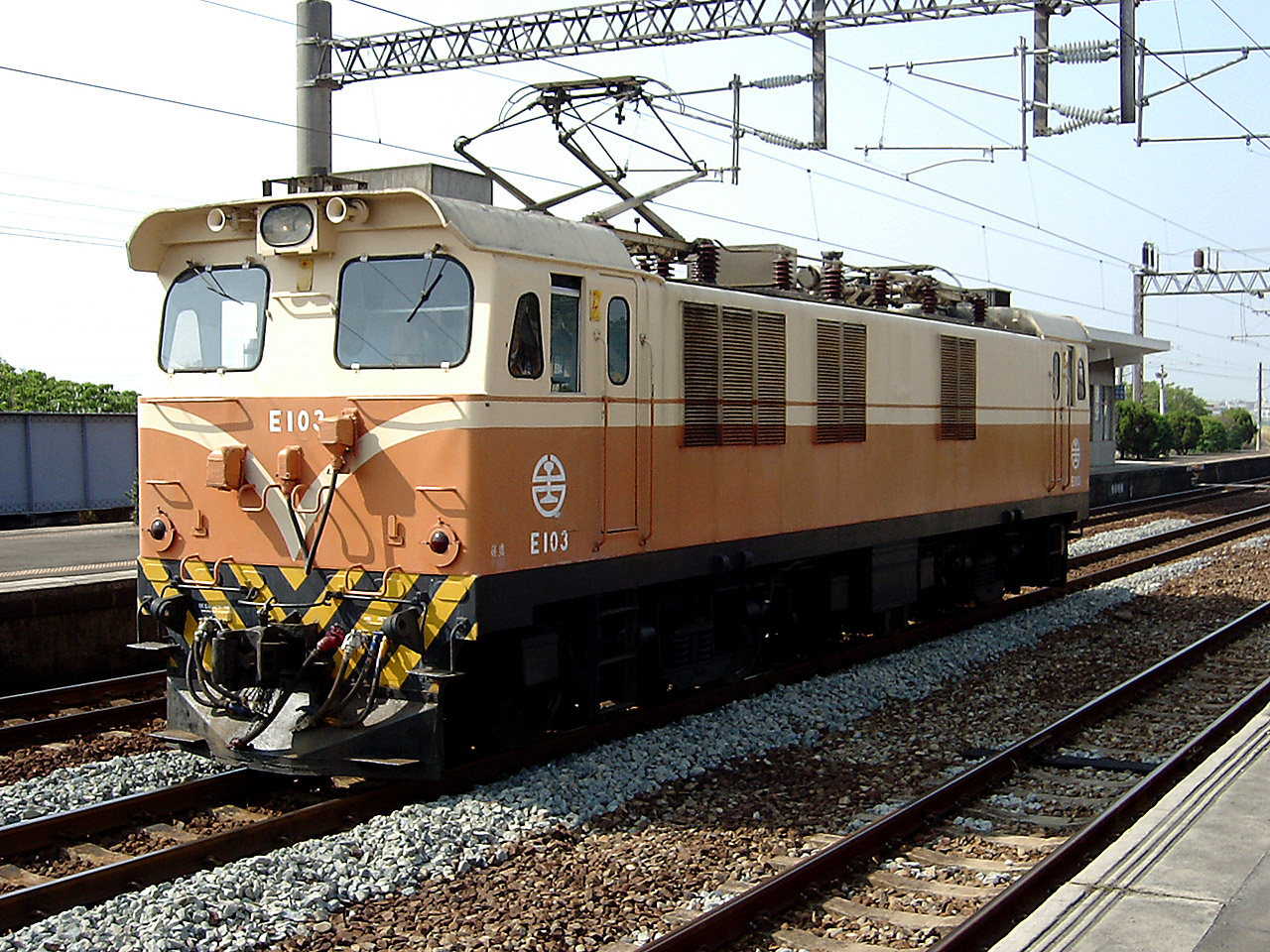 中文（台灣）: 臺灣鐵路管理局電力機車E103。